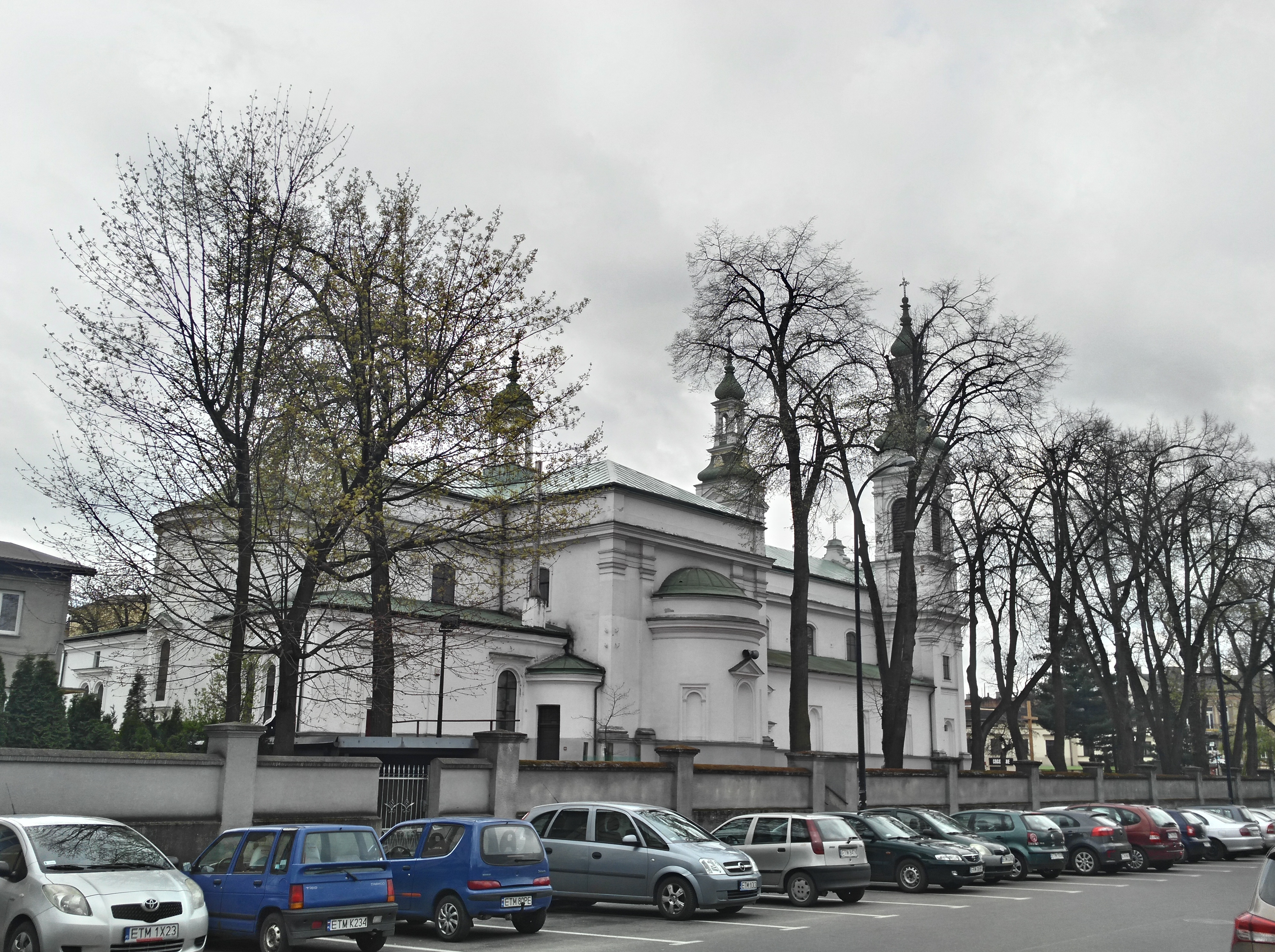 Neorenesansowy Kościół p.w. Św. Antoniego w Tomaszowie Mazowieckim z 1864 roku. Ufundowana przez fabrykantów miejskich dla w większości katolickich robotników. Wybudowany wg projektu Henryka Marconiego